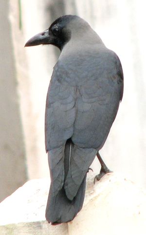 കാക്ക